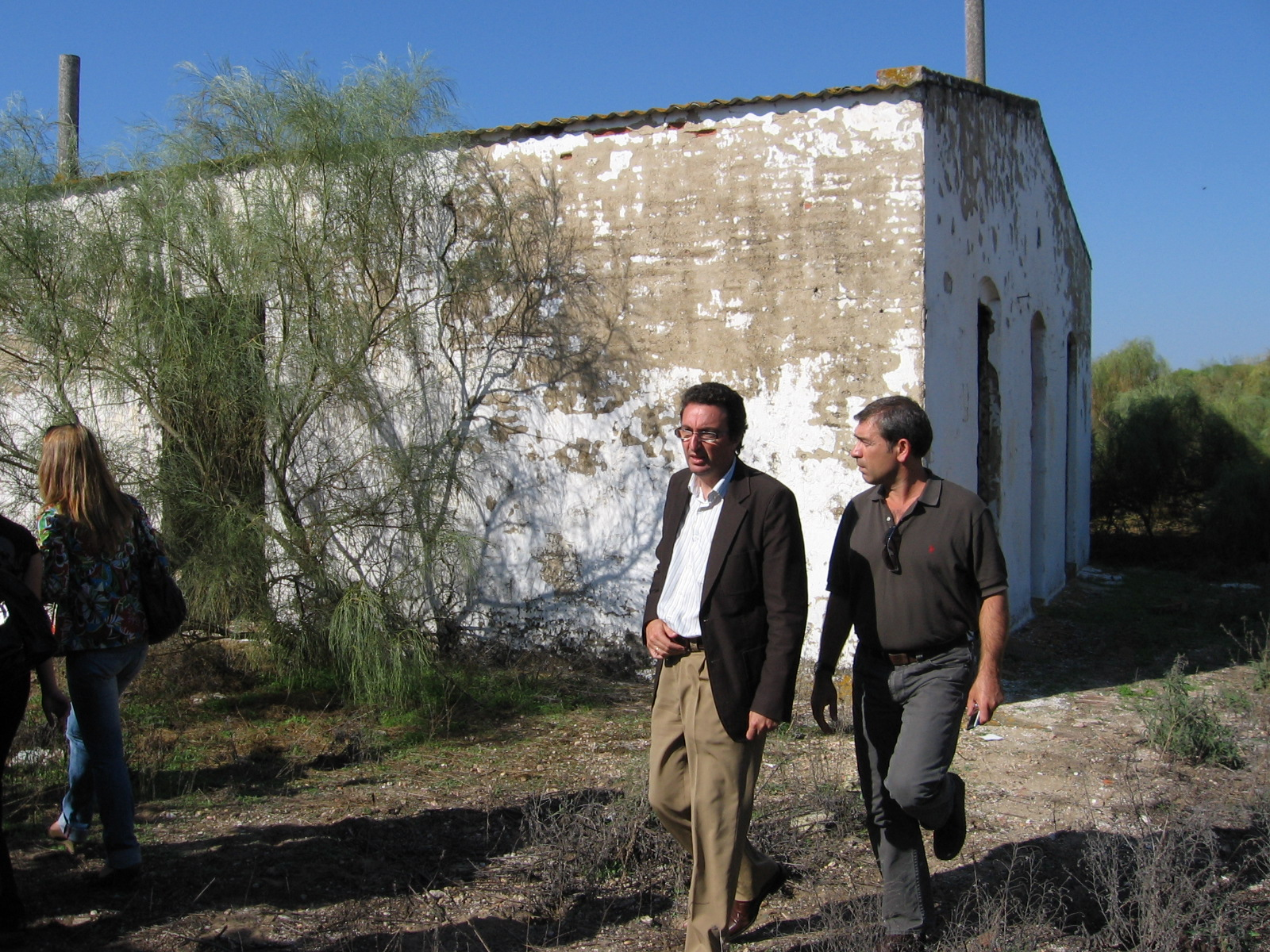 Visita realizada por el Alcalde de Lepe al Real de la Almadraba de Nueva Umbría en 2007.